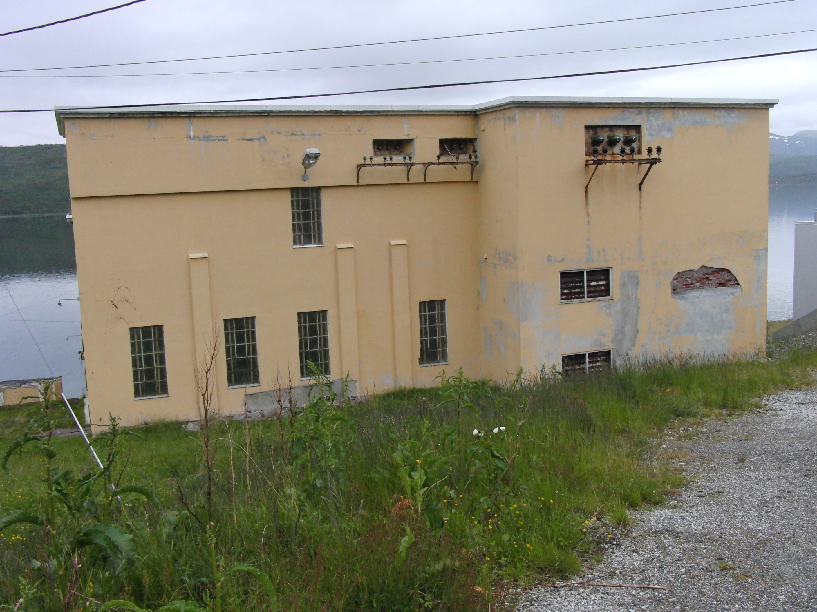 Simavik gamle kraftverk